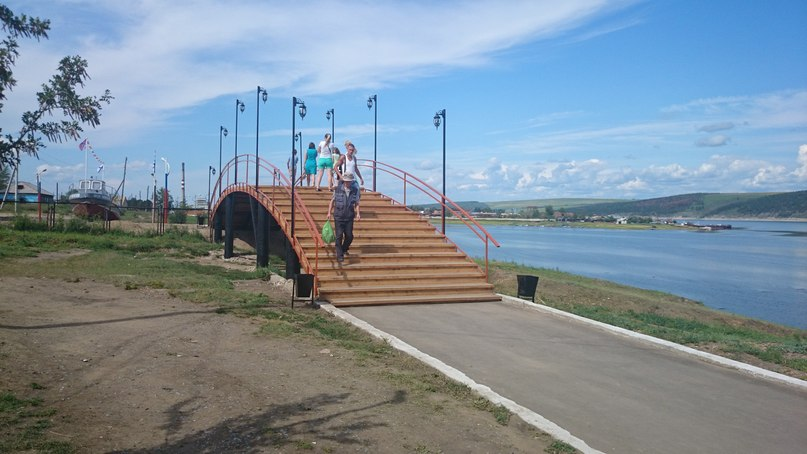 Мост на набережной в Свирске.